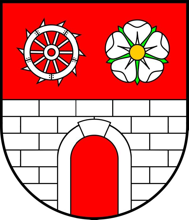 Herb gminy Gorzkowice.